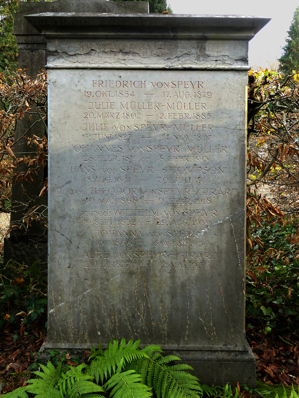 Wilhelm von Speyr (1852–1939) Dr.med., Psychiater, a.o. Professor an der Universität Bern, Direktor der Waldauklinik in Bern, Grab auf dem Friedhof Wolfgottesacker, Basel